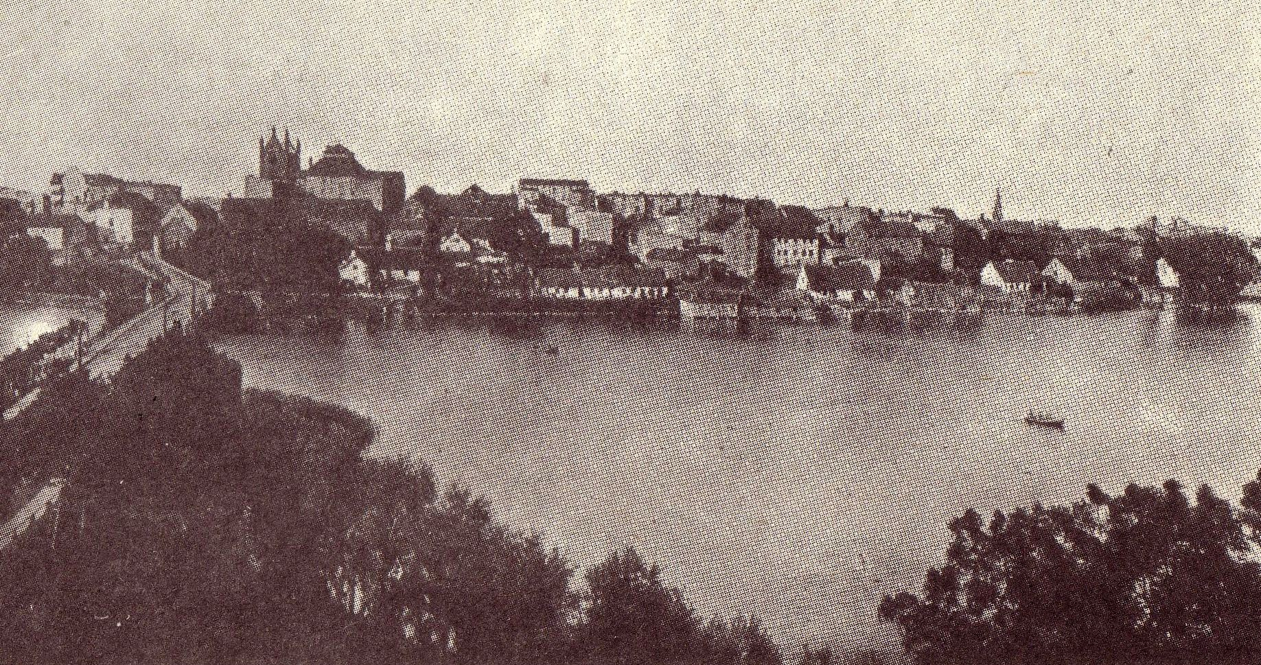 Fotografie der Stadt Lyck von der vorgelagerten Insel